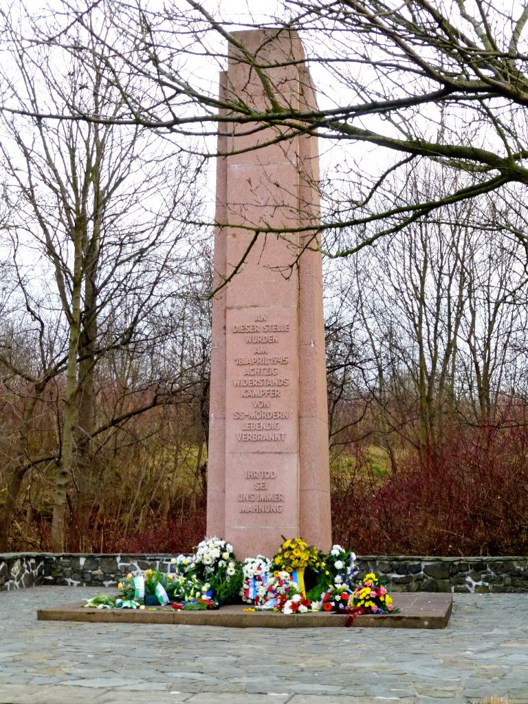 Theklaer Straße, Leipzig. Mahnmal in Gedenken an das Massaker von Abtnaundorf am 18. April 1945.